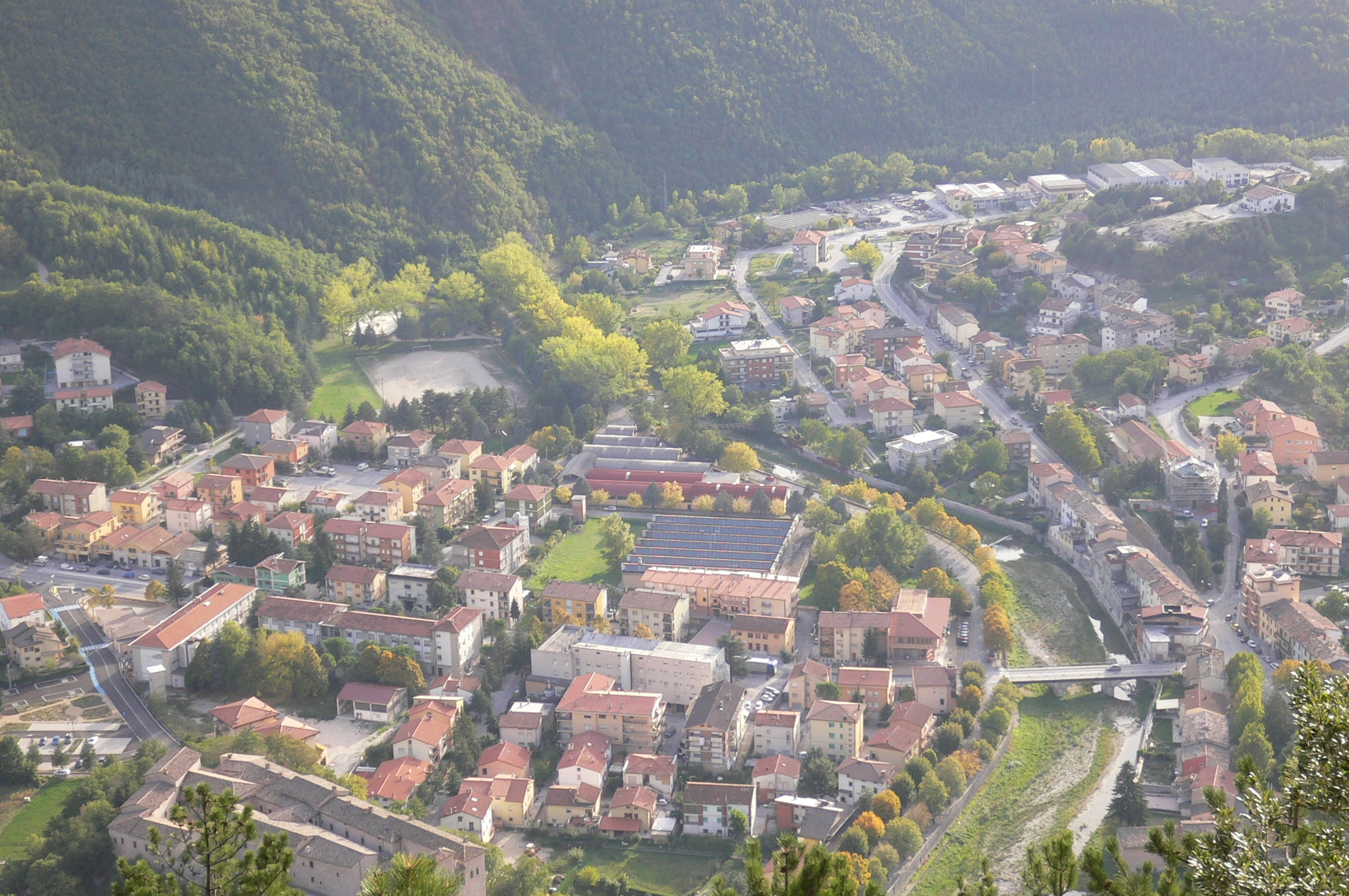 vista dall'alto di Piobbico orientamento da Nord